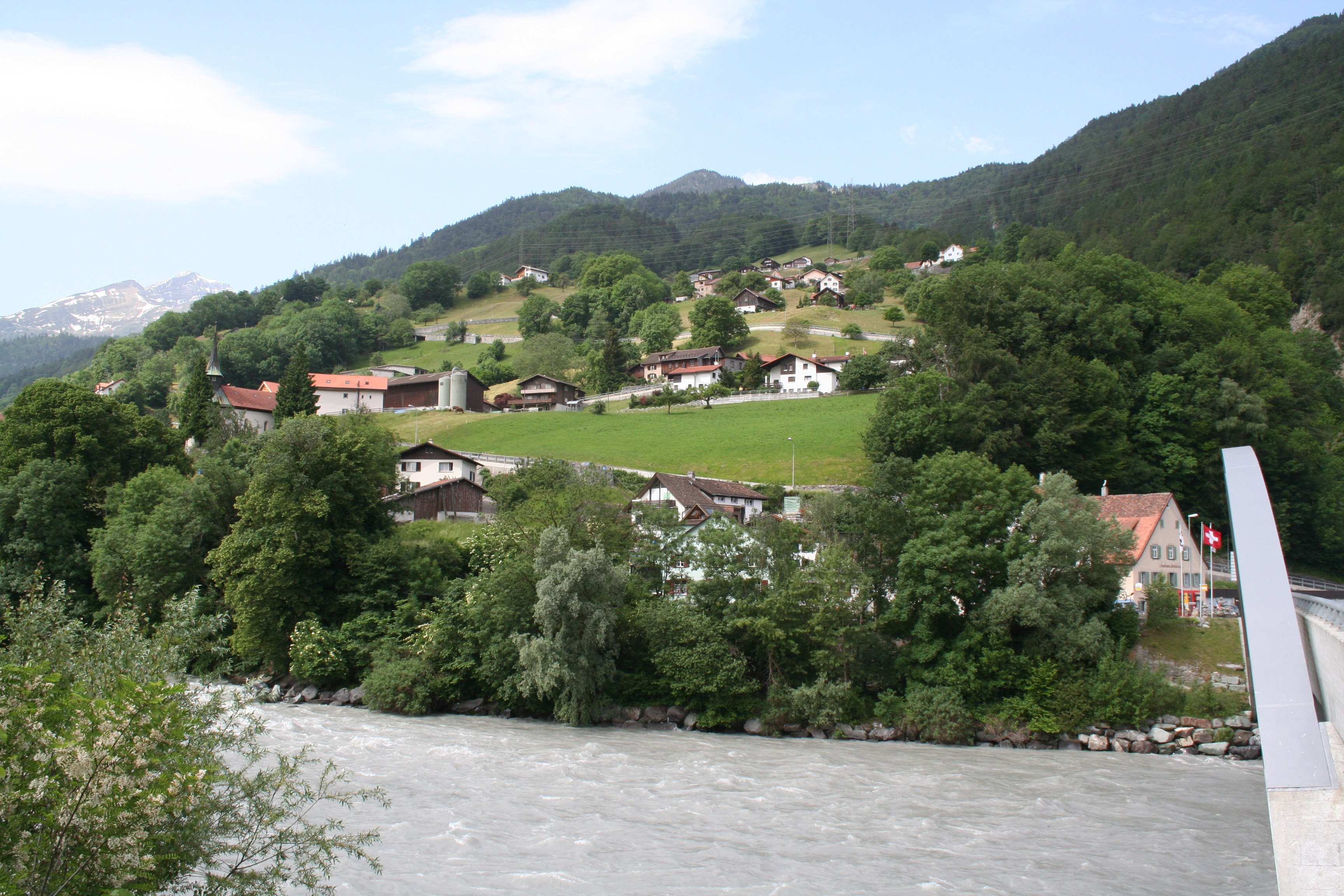 Mastrils